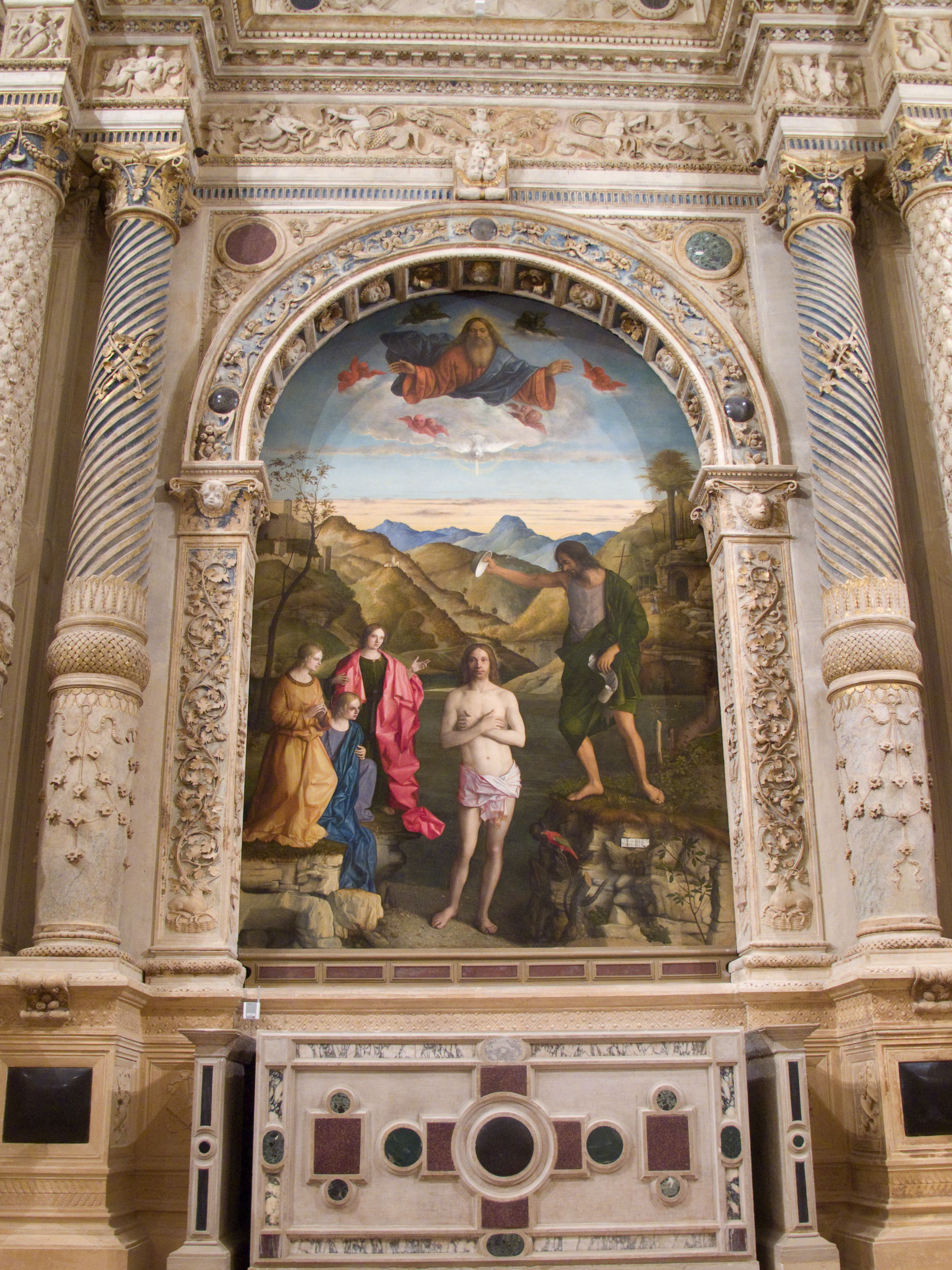 Vicenza - Chiesa di Santa Corona - Altare Garzadori